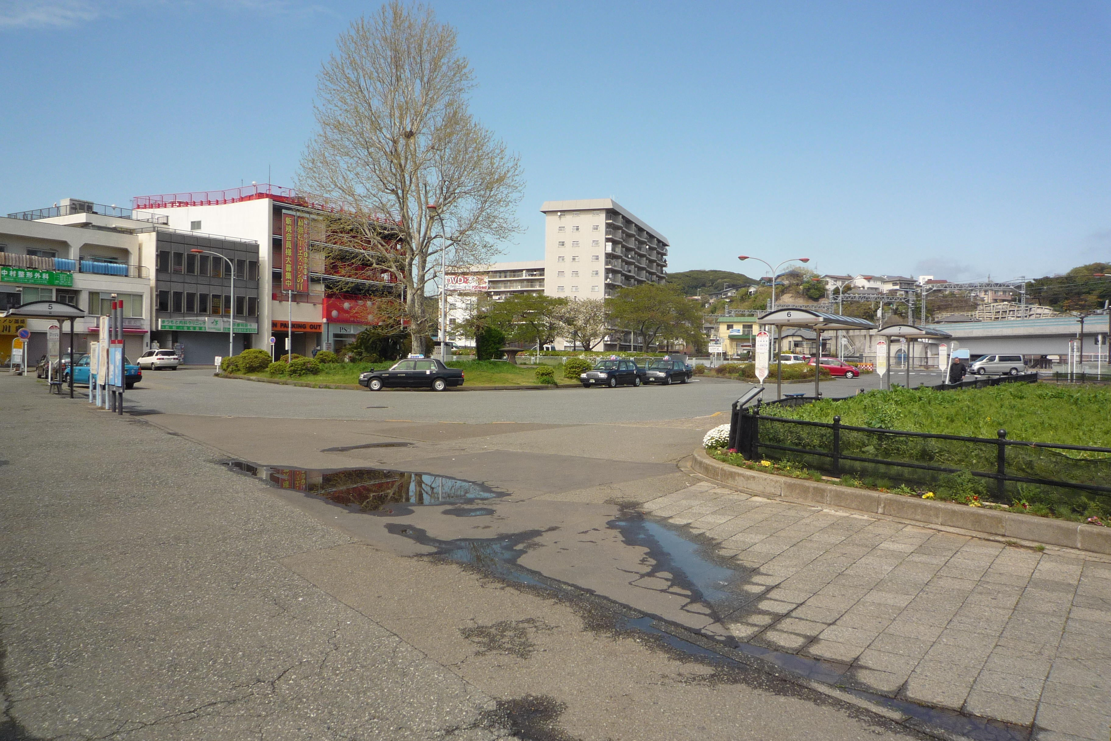 久里浜駅前バスターミナル